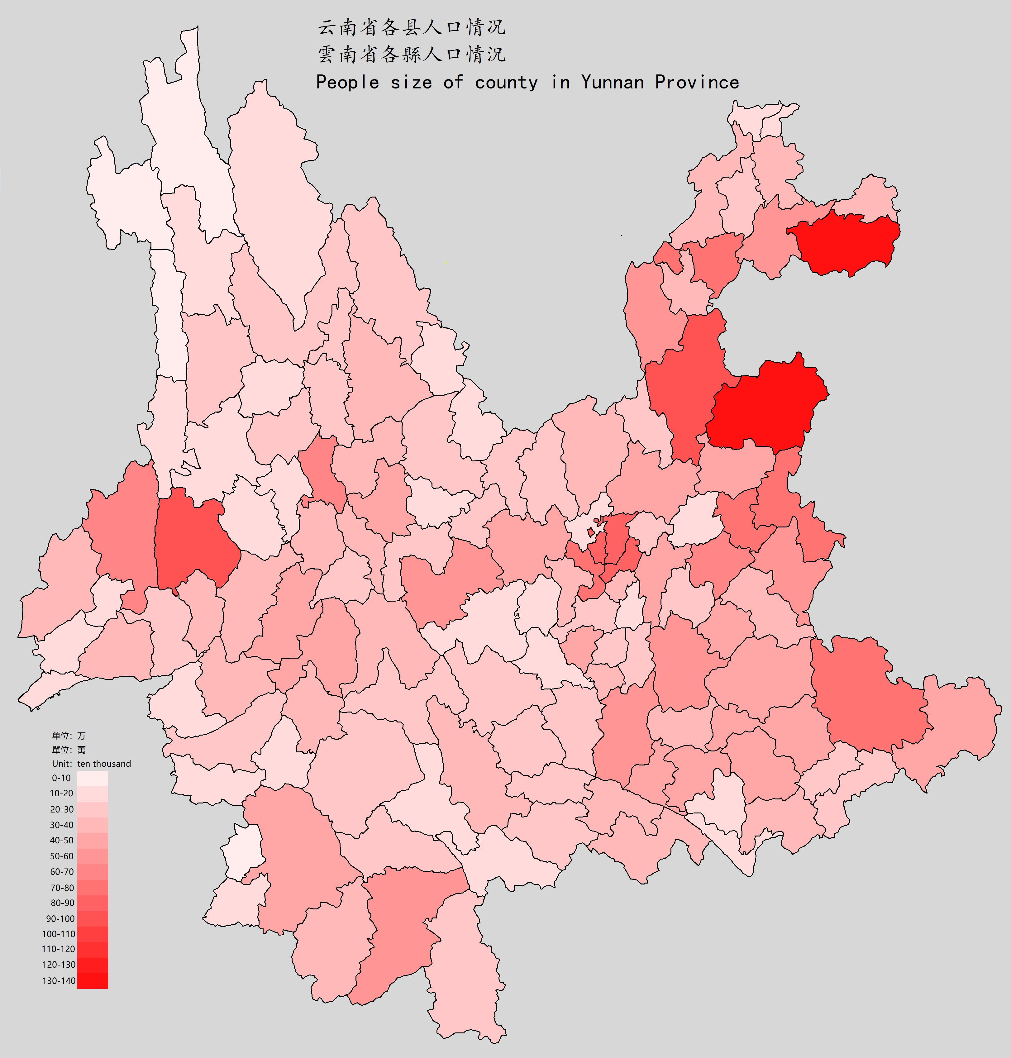 中文（中国大陆）: 云南省各县人口总量